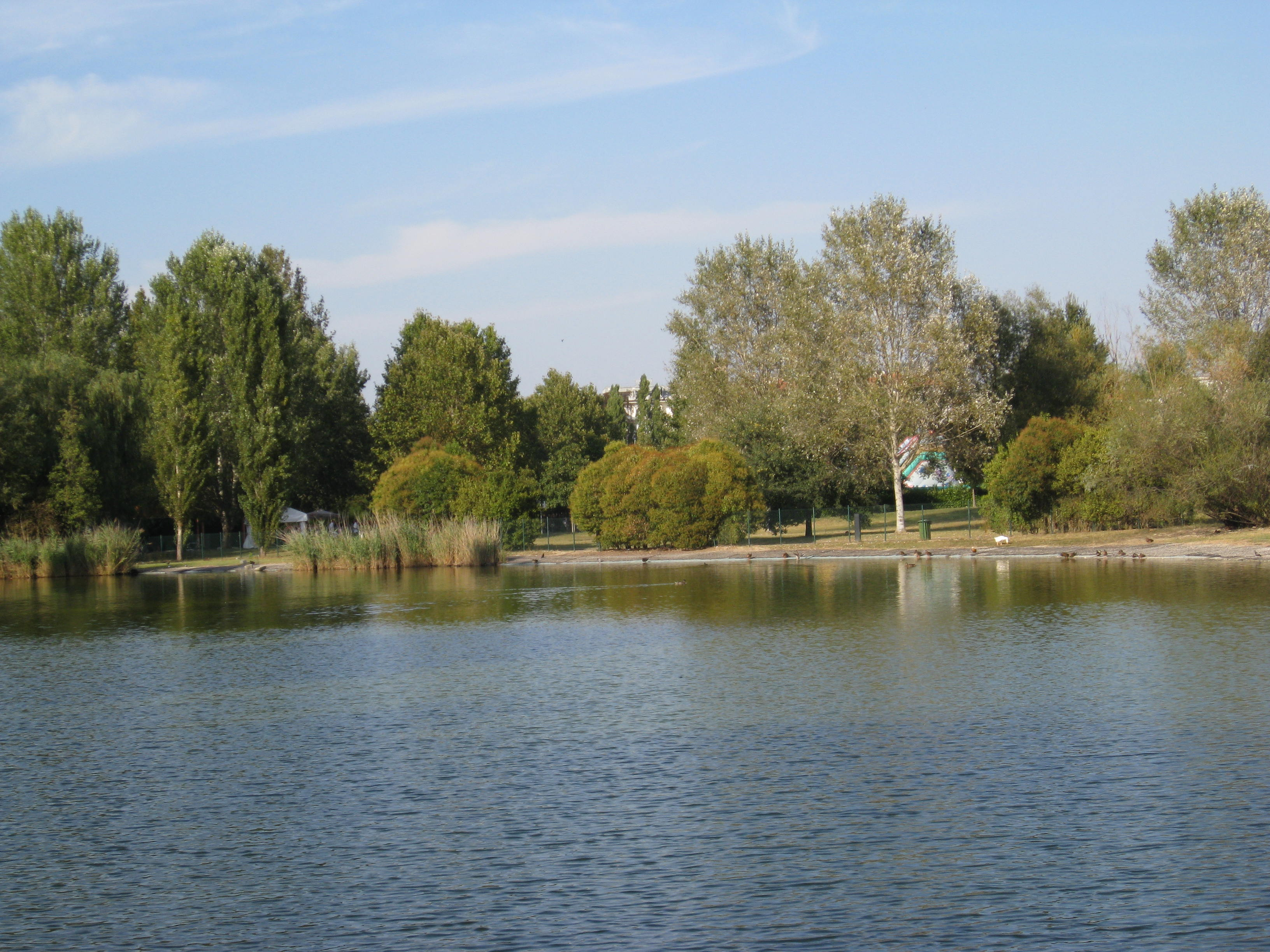 Forlì, Parco Urbano Franco Agosto, il lago.